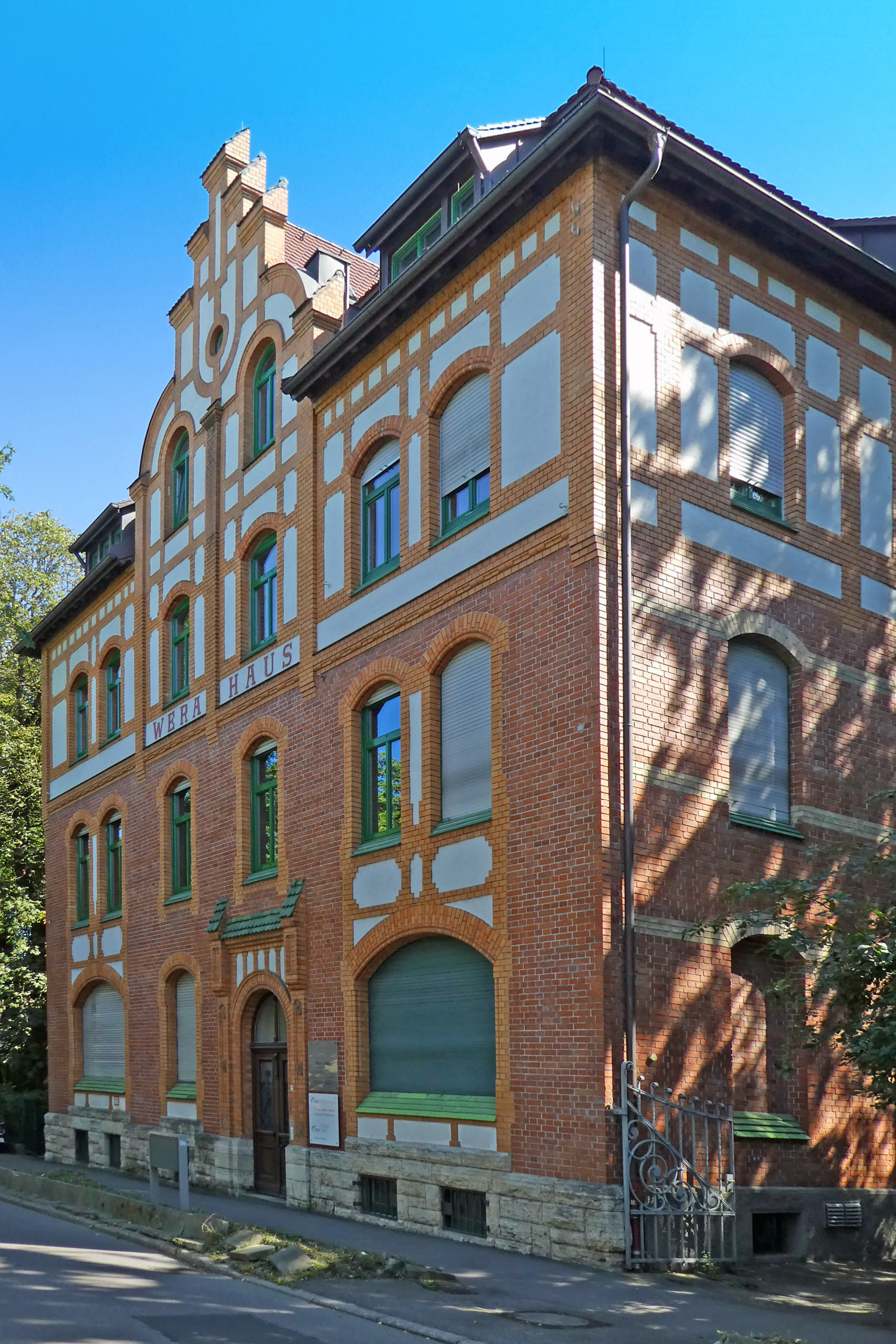 Denkmalgeschütztes Gebäude in Stuttgart-Berg, Nißlestr. 22 (Wera-Haus)